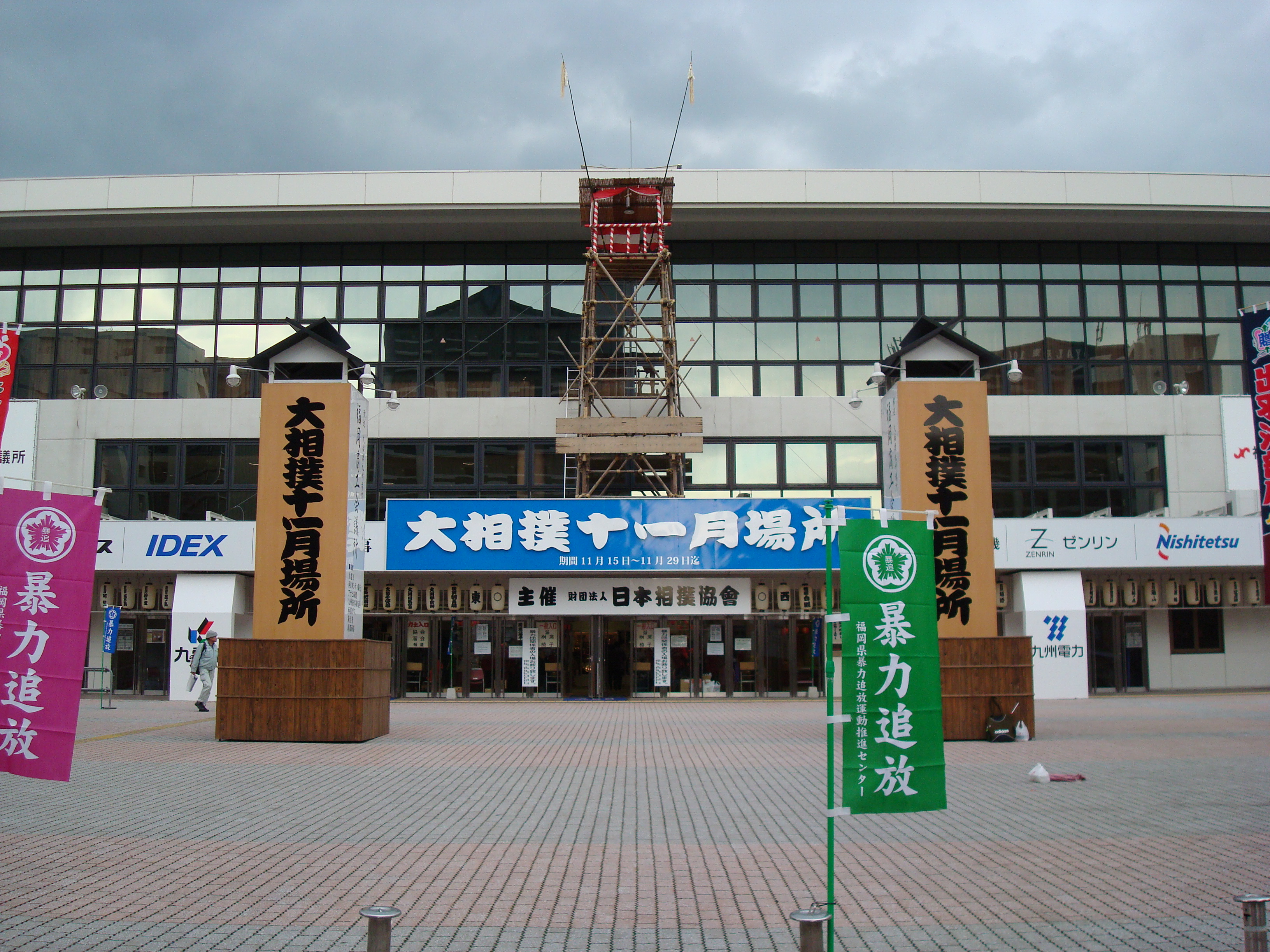 大相撲 九州場所